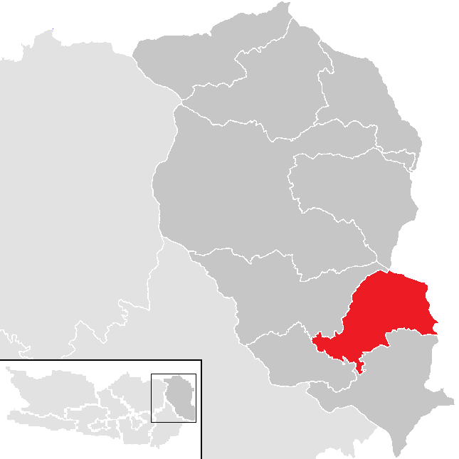 Bezirk Wolfsberg